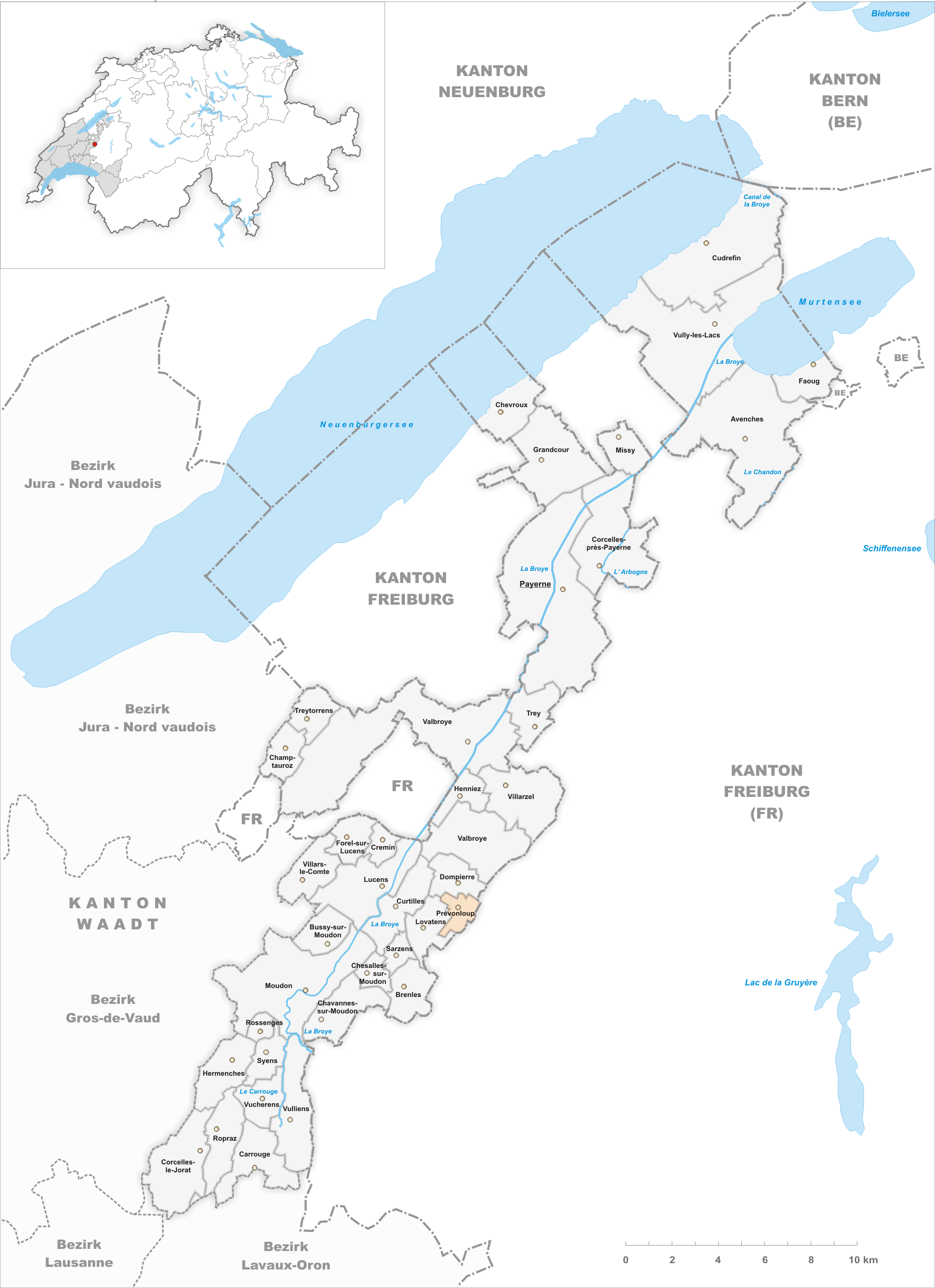 Municipality Prévonloup